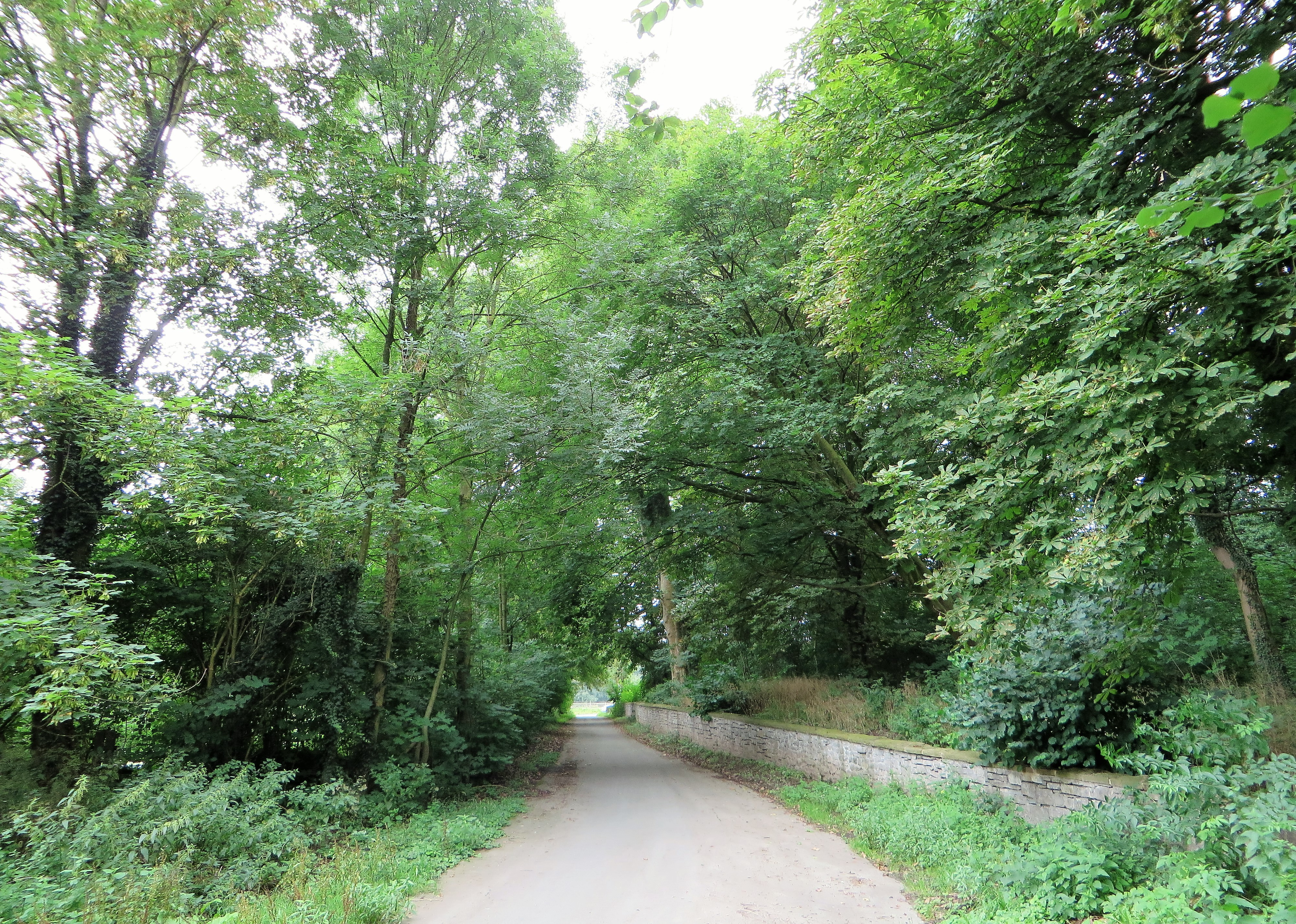 Geschützter Landschaftsbestandteil „Park und Teich Gut Herbeck“ in Hagen, nördlich von Herbeck. Er besteht aus einem verwilderten Park (rechts) mit mächtigen Althölzern, einer gehölzbestandenen Böschungskante und einem südlich des Lennefährenweges (Foto) gelegenen Teich mit einem umfangreichen Röhrichtbestand (links).